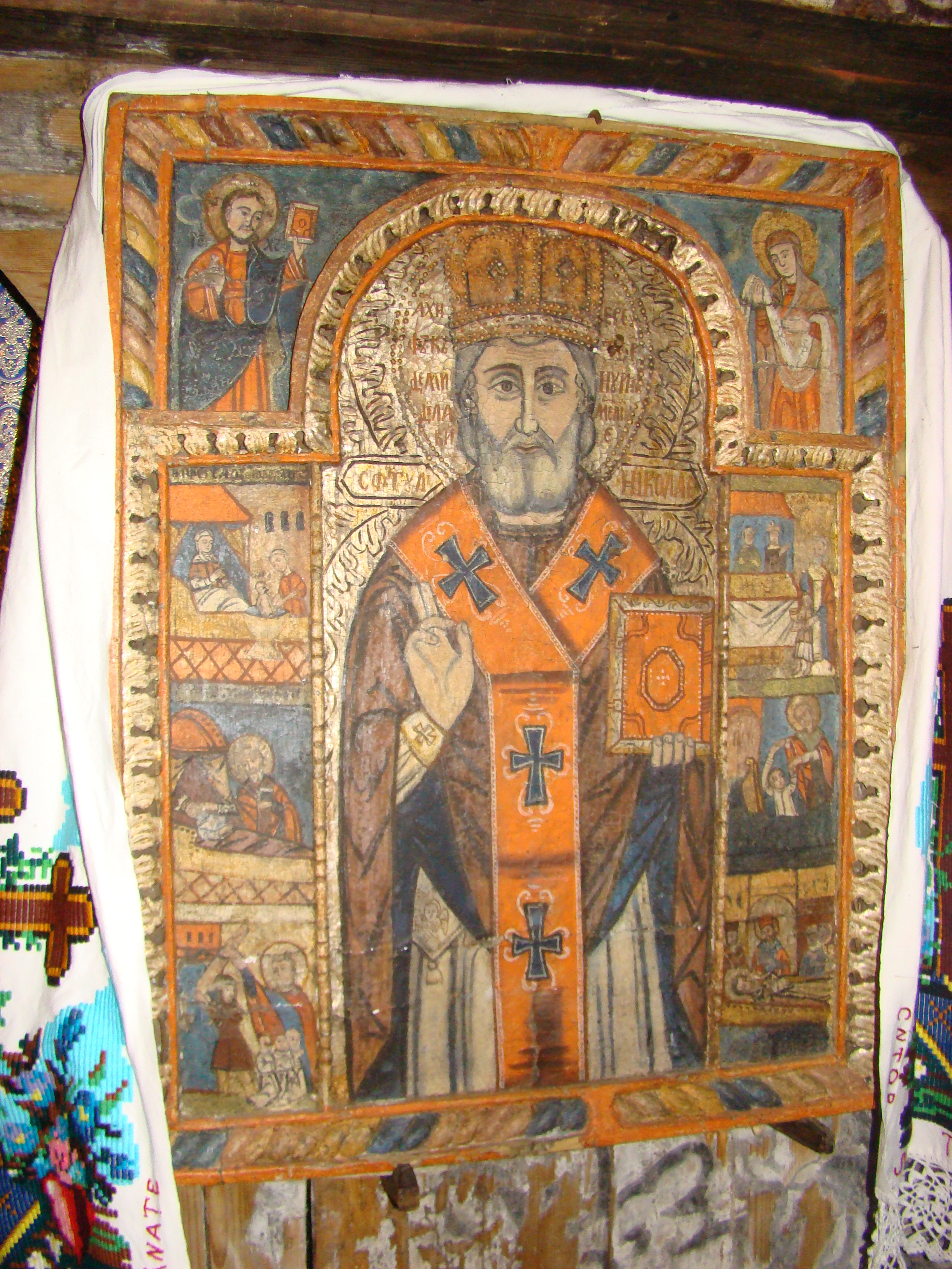 Biserica de lemn din Budești-Josani, județul Maramureș